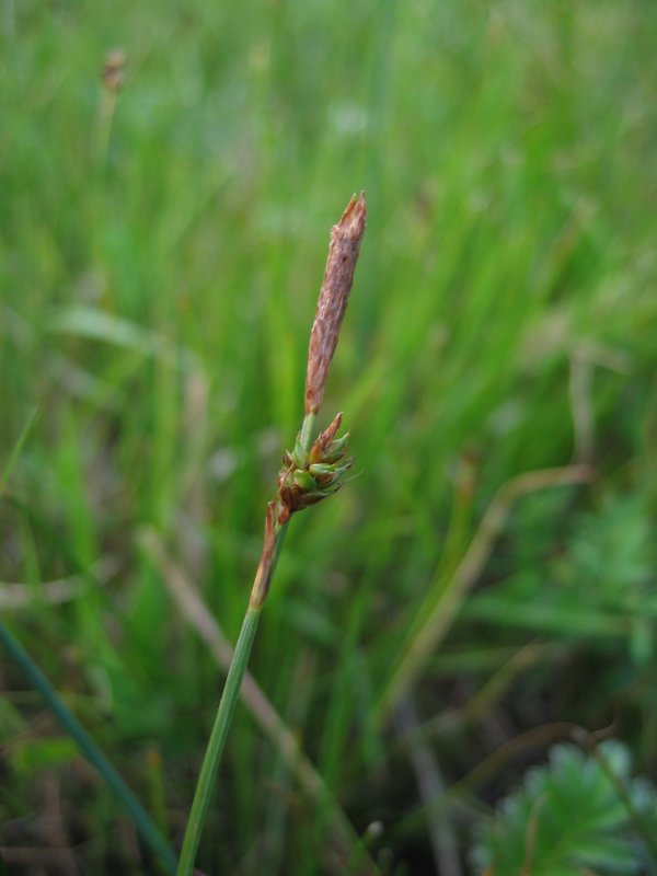 Obere männliche Blüten der Entferntährigen Segge Carex distans, Zingst